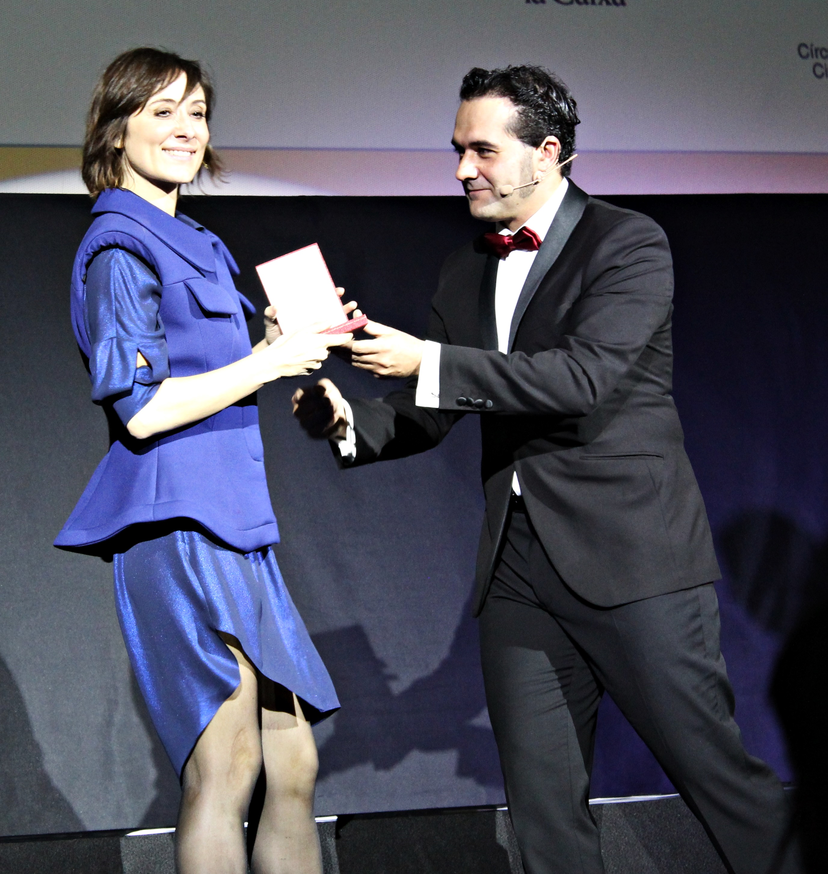 La actriz española Nathalie Poza recibe el premio a la mejor actriz de manos de Alfonso Sánchez en la 73 edición de las Medallas del Círculo de Escritores Cinematográficos.